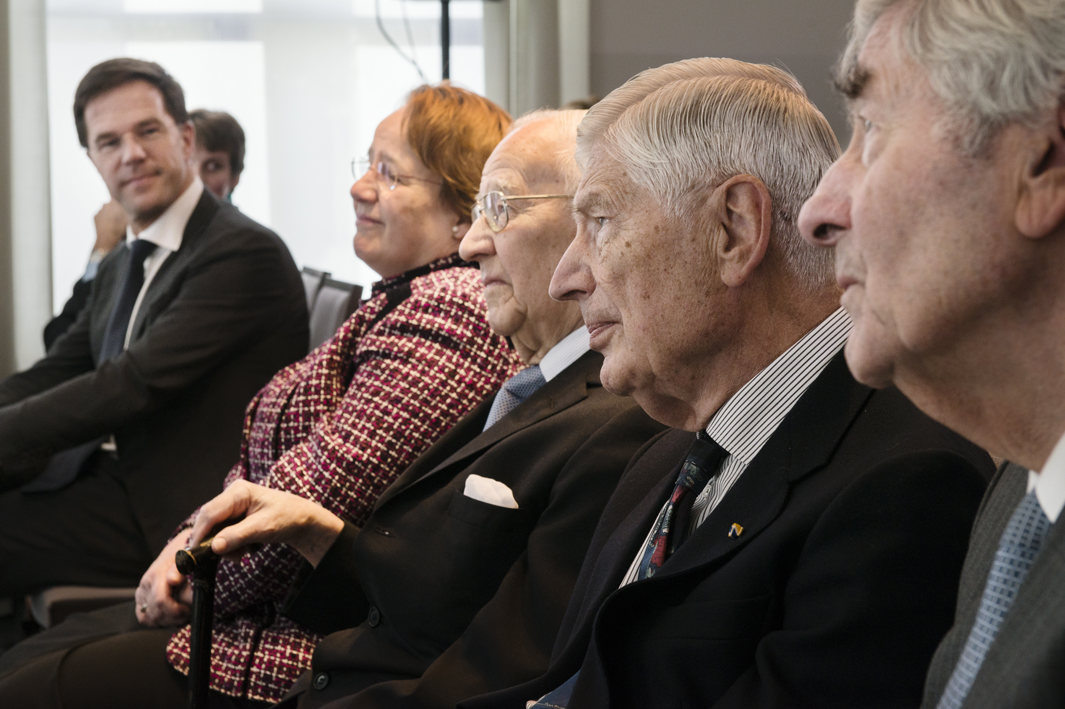 Oud minister-presidenten Ruud Lubbers, Dries van Agt, Piet de Jong en Mark Rutte.